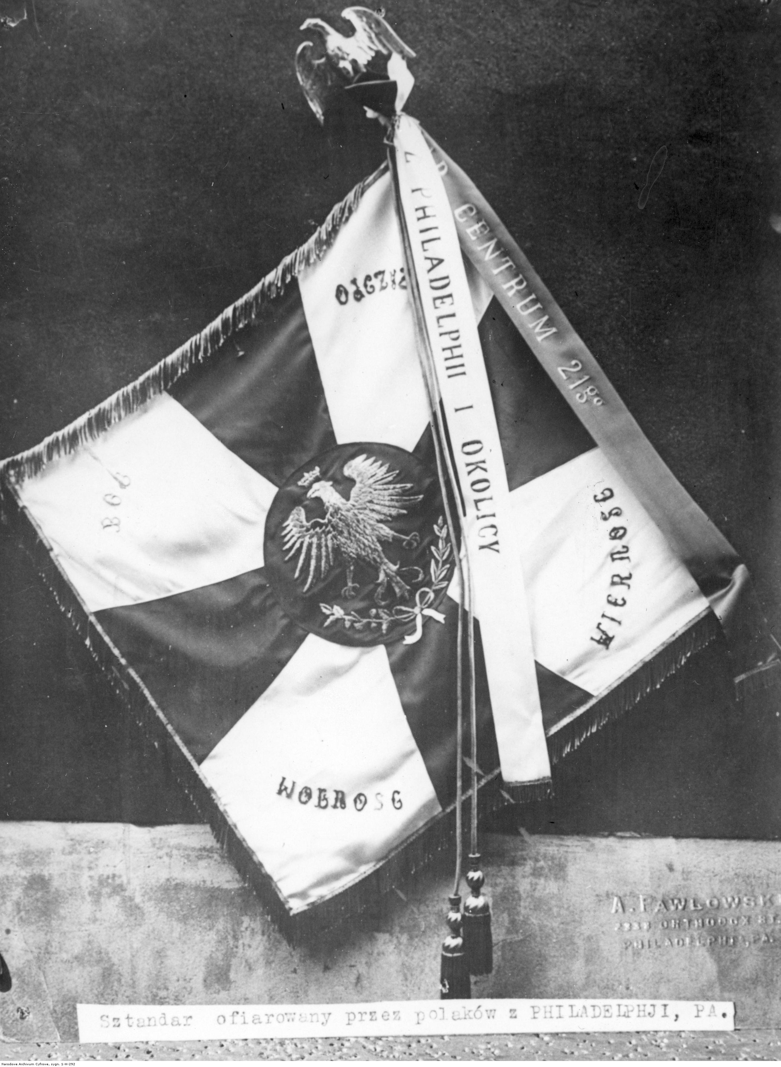 Sztandar ofiarowany Armii Polskiej we Francji przez mieszkańców Filadelfii. Koncern Ilustrowany Kurier Codzienny - Archiwum Ilustracji. Sygnatura: 1-H-292